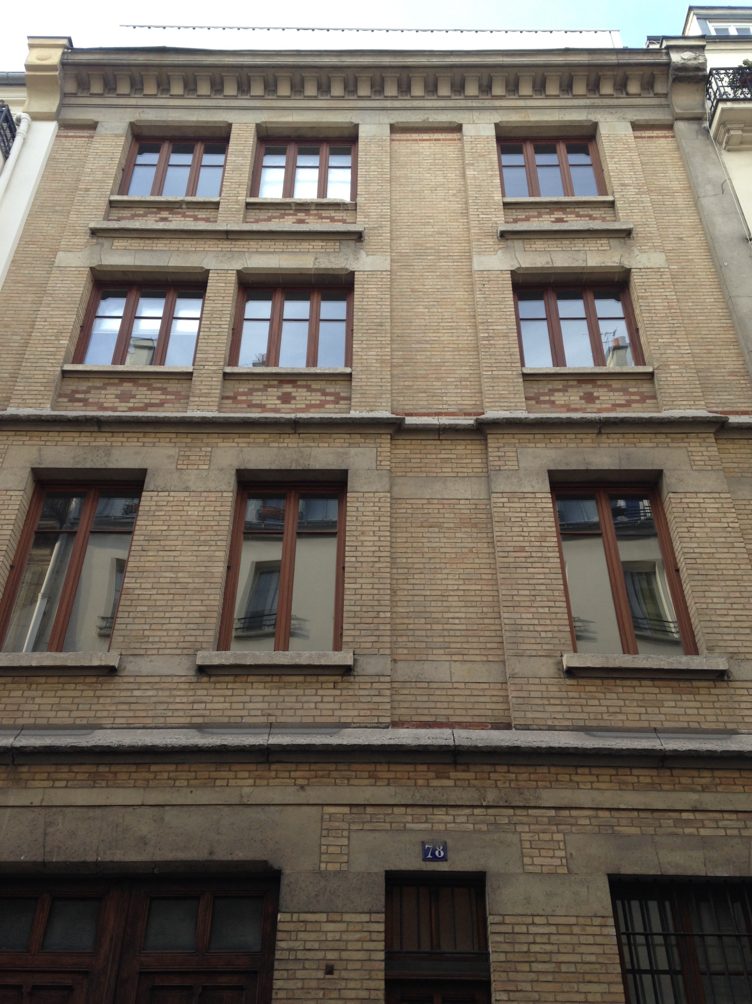 façade du 78 rue la Condamine, dans le 17ème arrondissement de Paris ; Façade factice cachant un centre de traitement de données